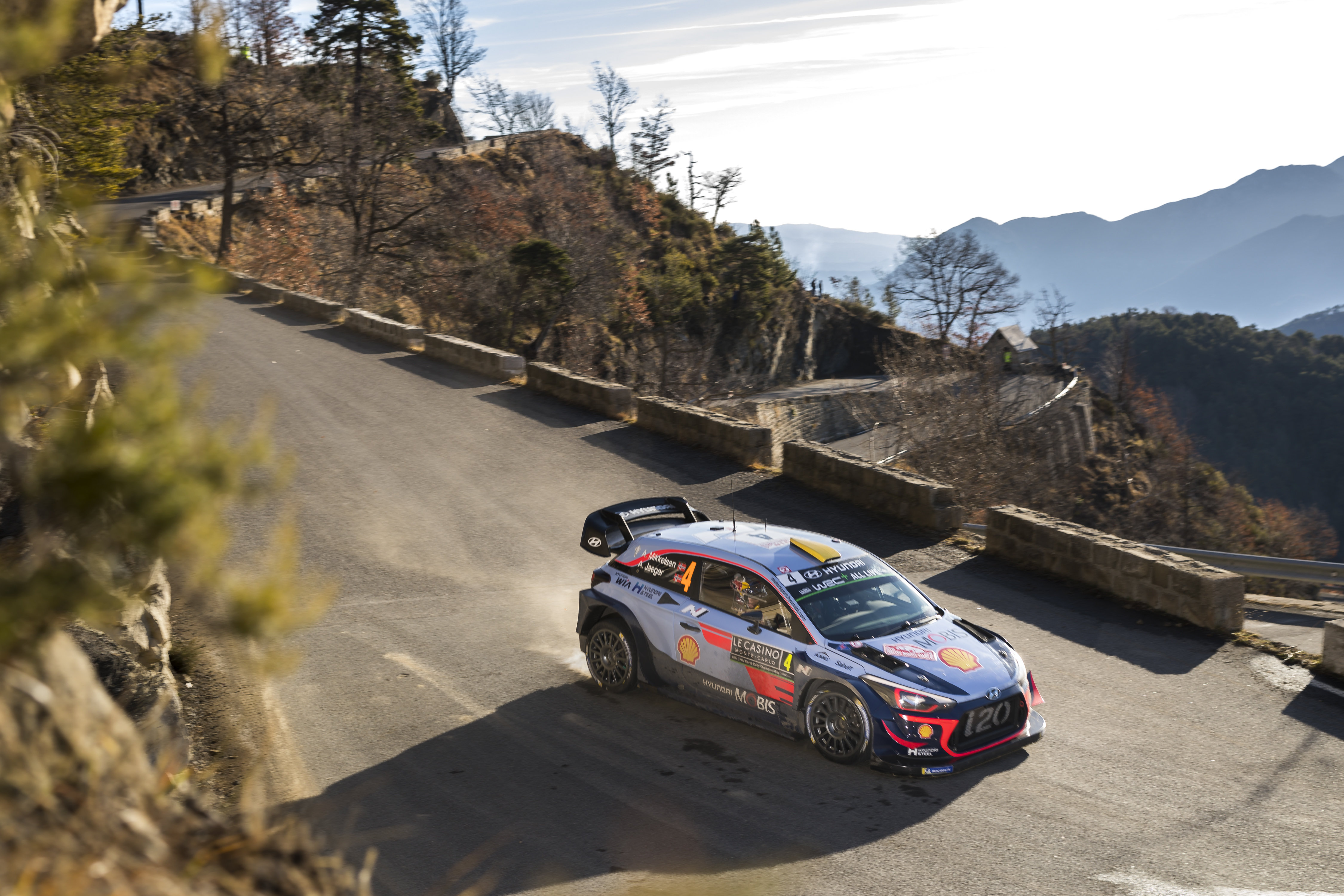 Rajd Monte Carlo 2018 Andreas Mikkelsen